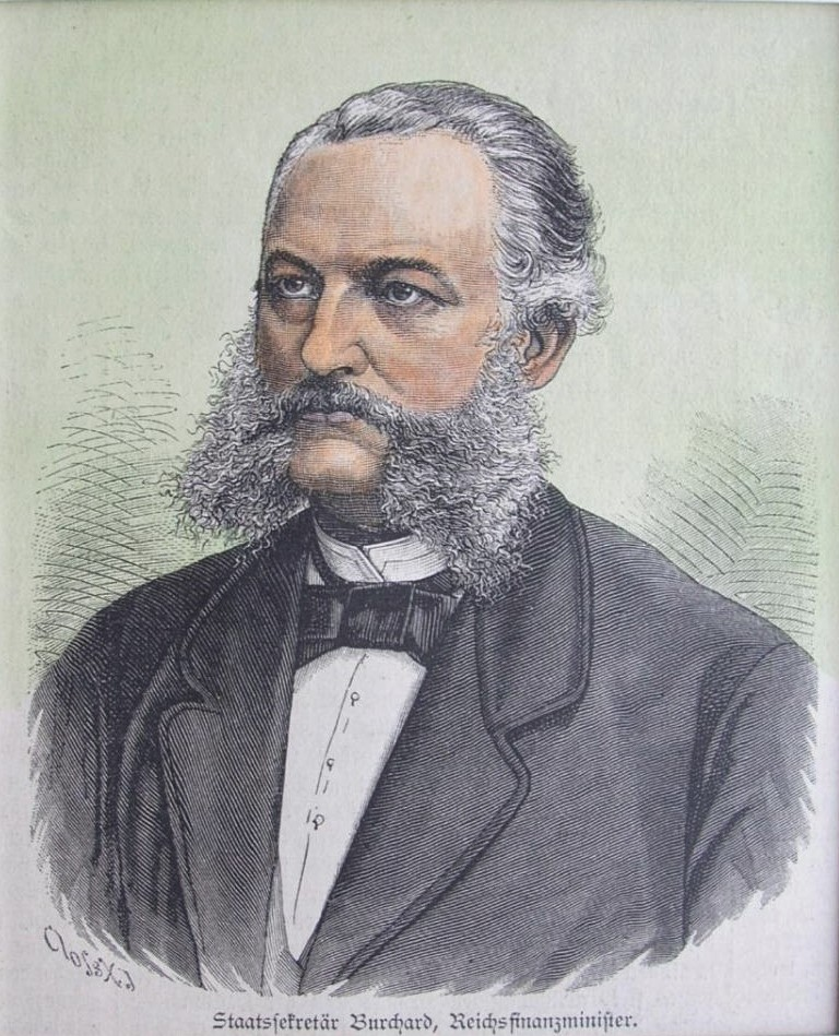 Emil von Burchard, kolorierter Holzstich, ca. 14 x 11 cm